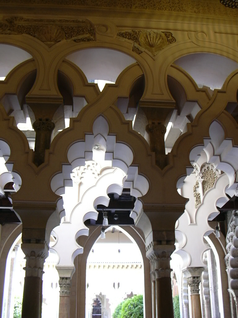 La Aljafería - Palacio taifa